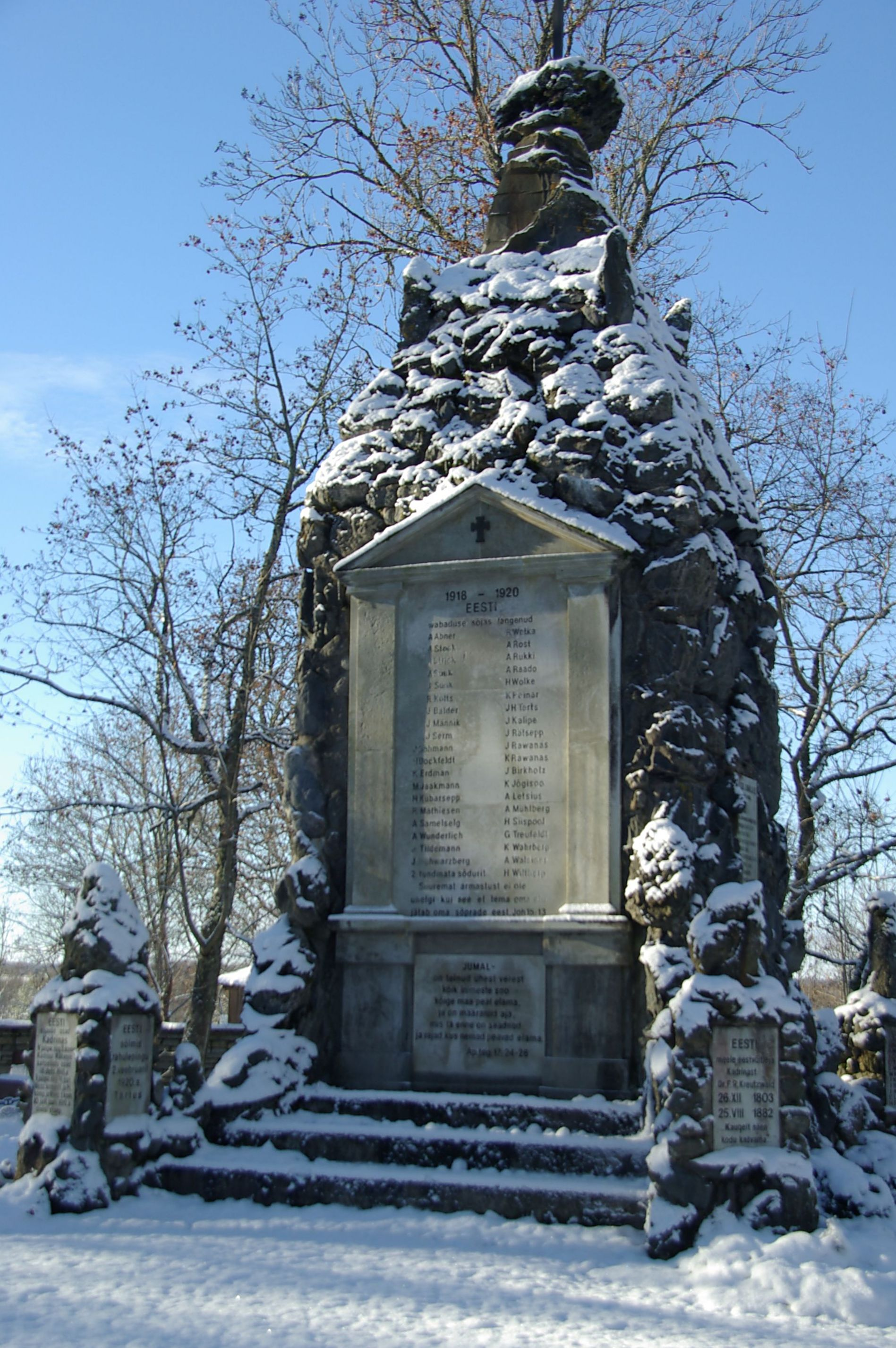 Lääne-Viru maakond, Kadrina vald, Kadrina alevik